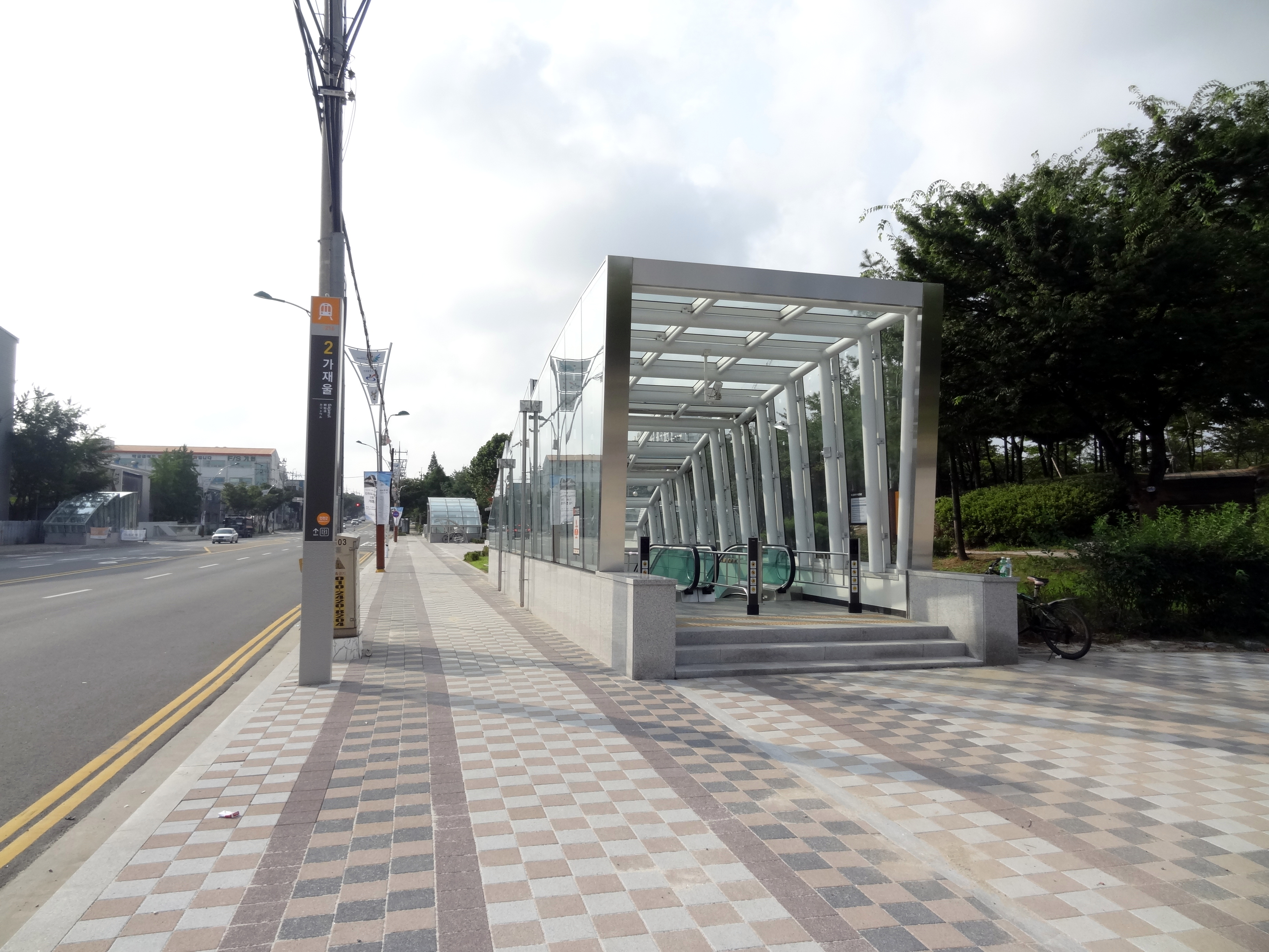 가재울역 2번 출구.